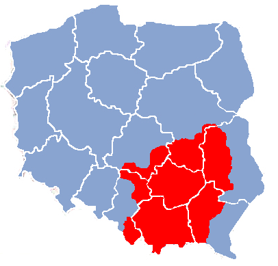 Map of Lesser Poland (Małopolska)